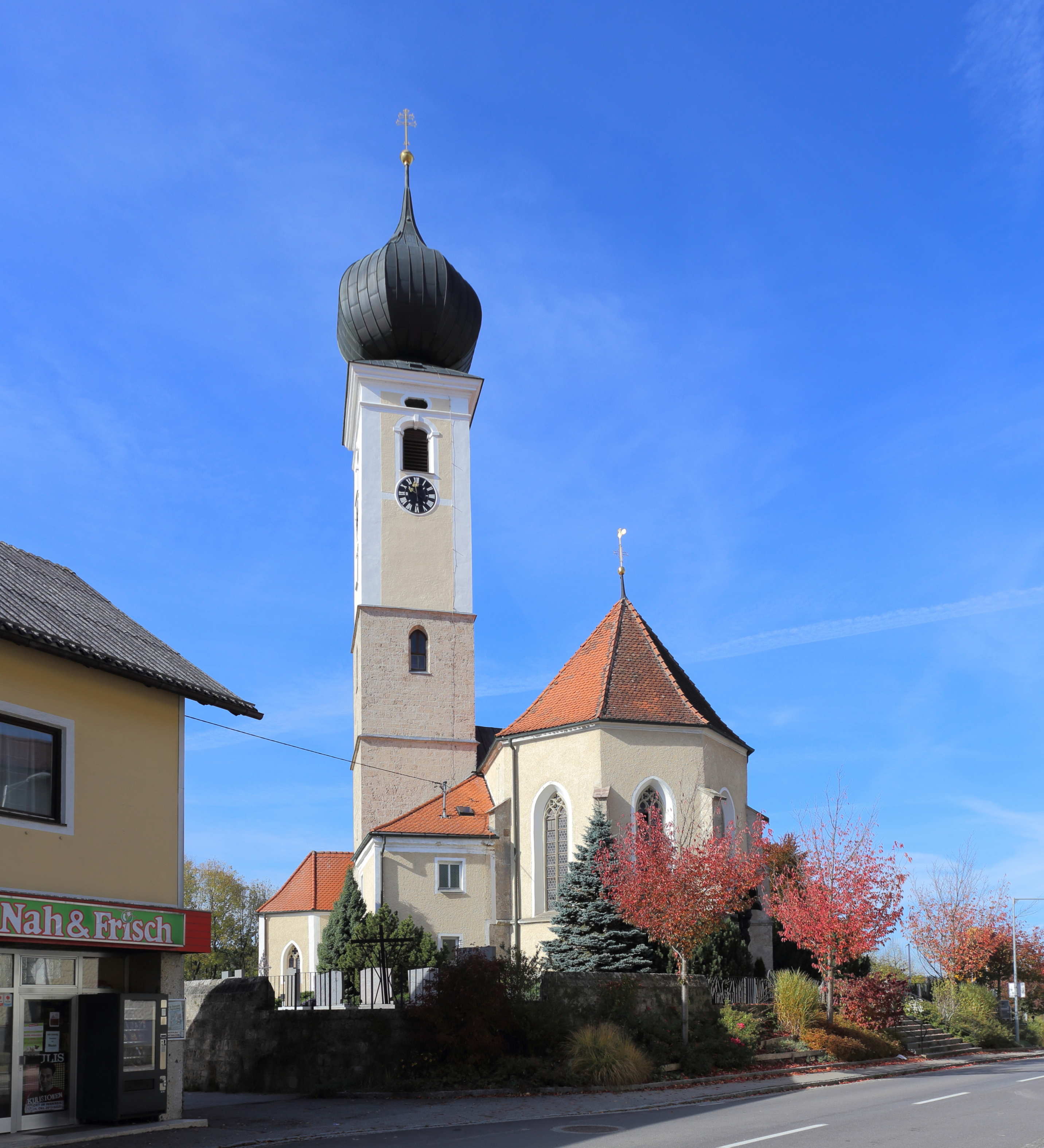 Die katholische Pfarrkirche hl. Stephan der oberösterreichischen Gemeinde Gurten. Ein gotischer Sakralbau, wobei dem Turm ein barockes Obergeschoss mit einem Zwiebelhelm aufgesetzt wurde. Die Inneneinrichtung stammt teilweise aus den Werkstätten der Schwanthalers.